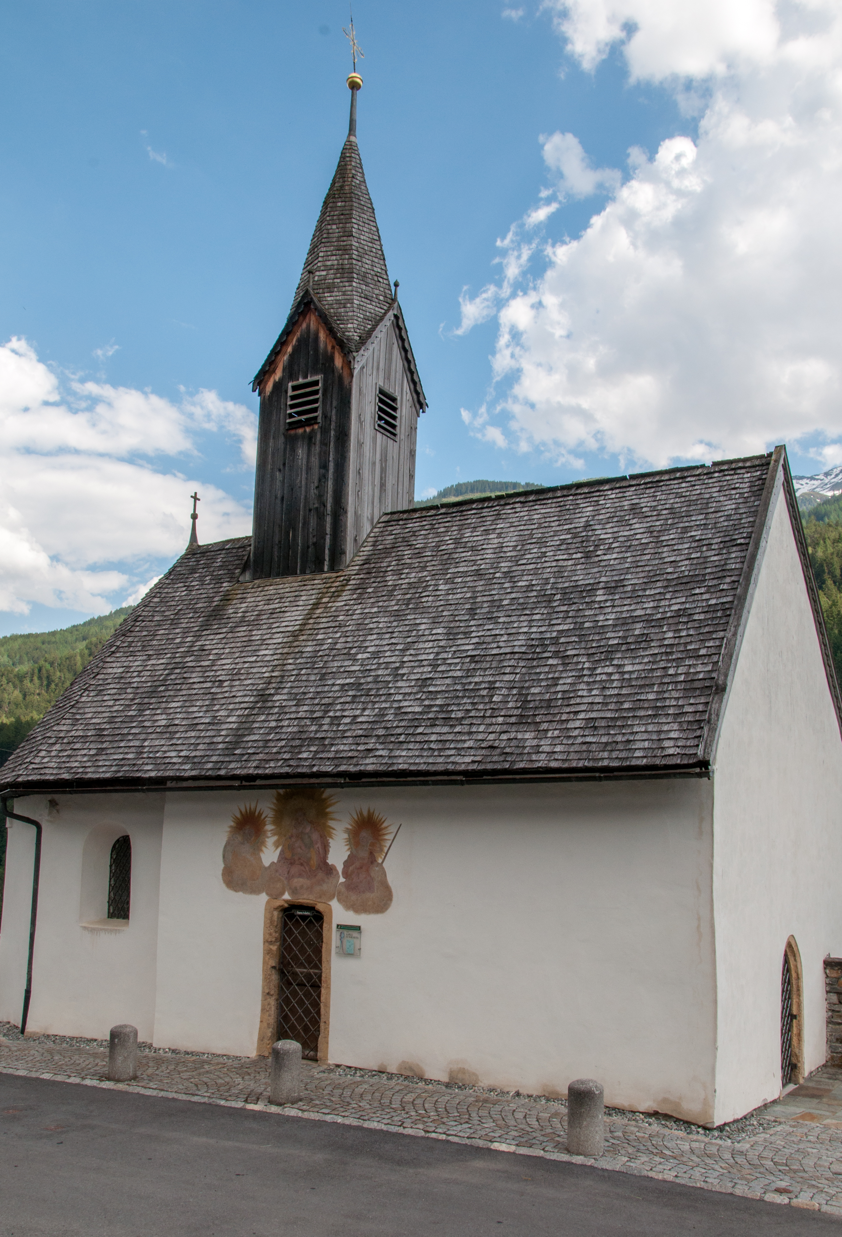 Kapelle hl. Margareta